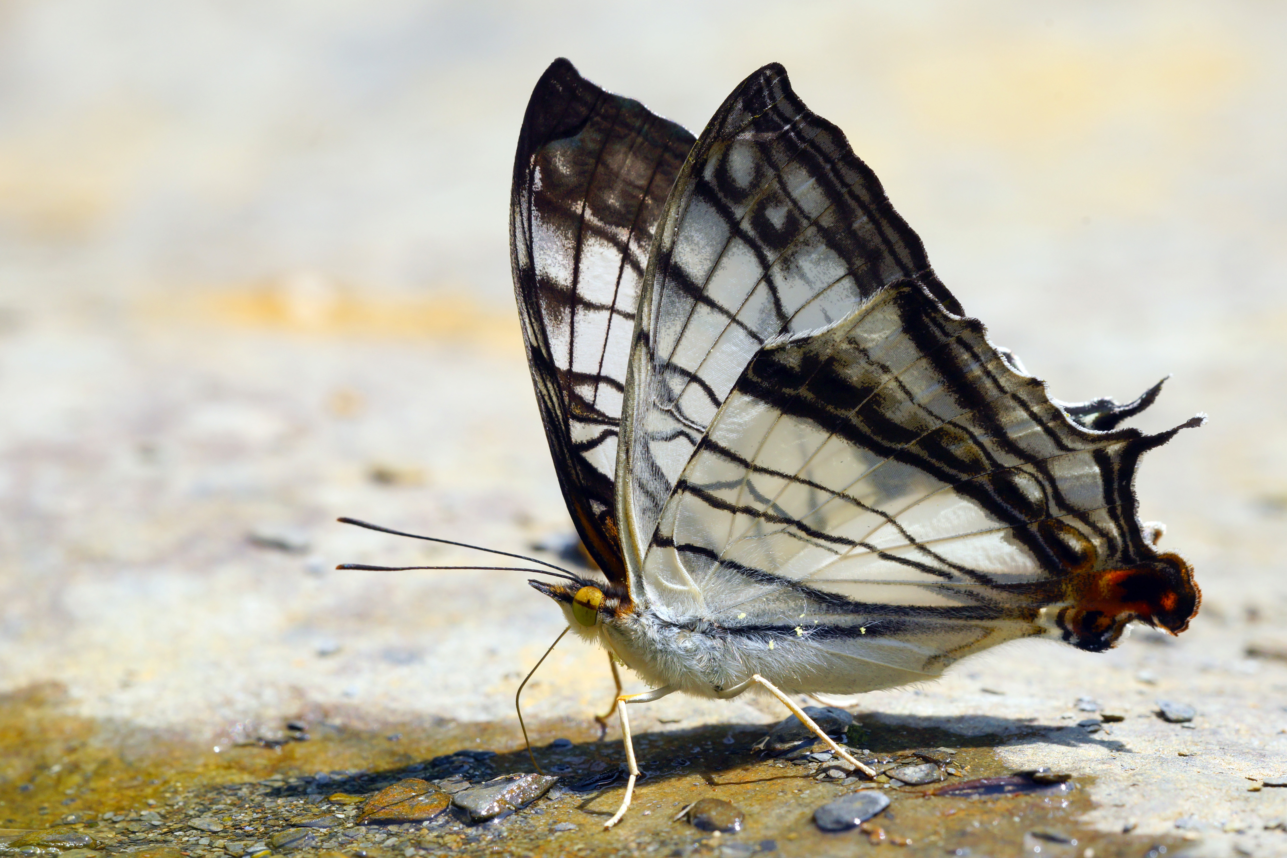 網絲蛺蝶 Cyrestis thyodamas formosana